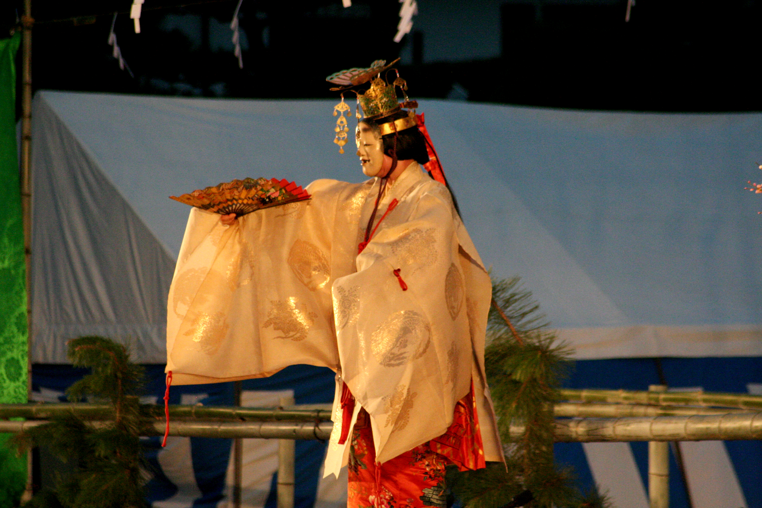 2009年7月31日に姫路城三の丸広場で行なわれた姫路薪能の様子。